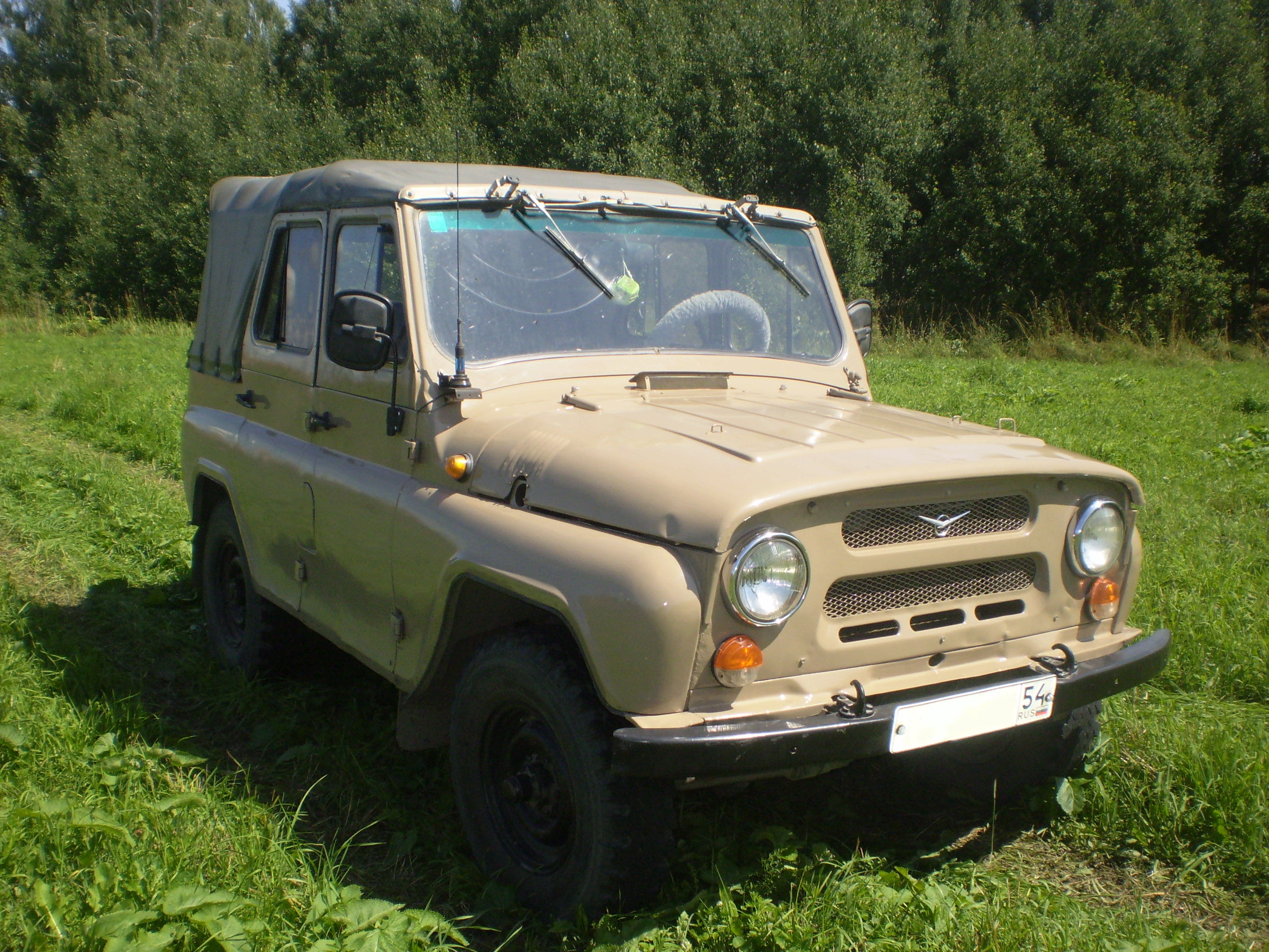 УАЗ-31512.